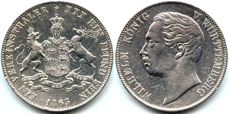 1 союзный талер Вюртемберг